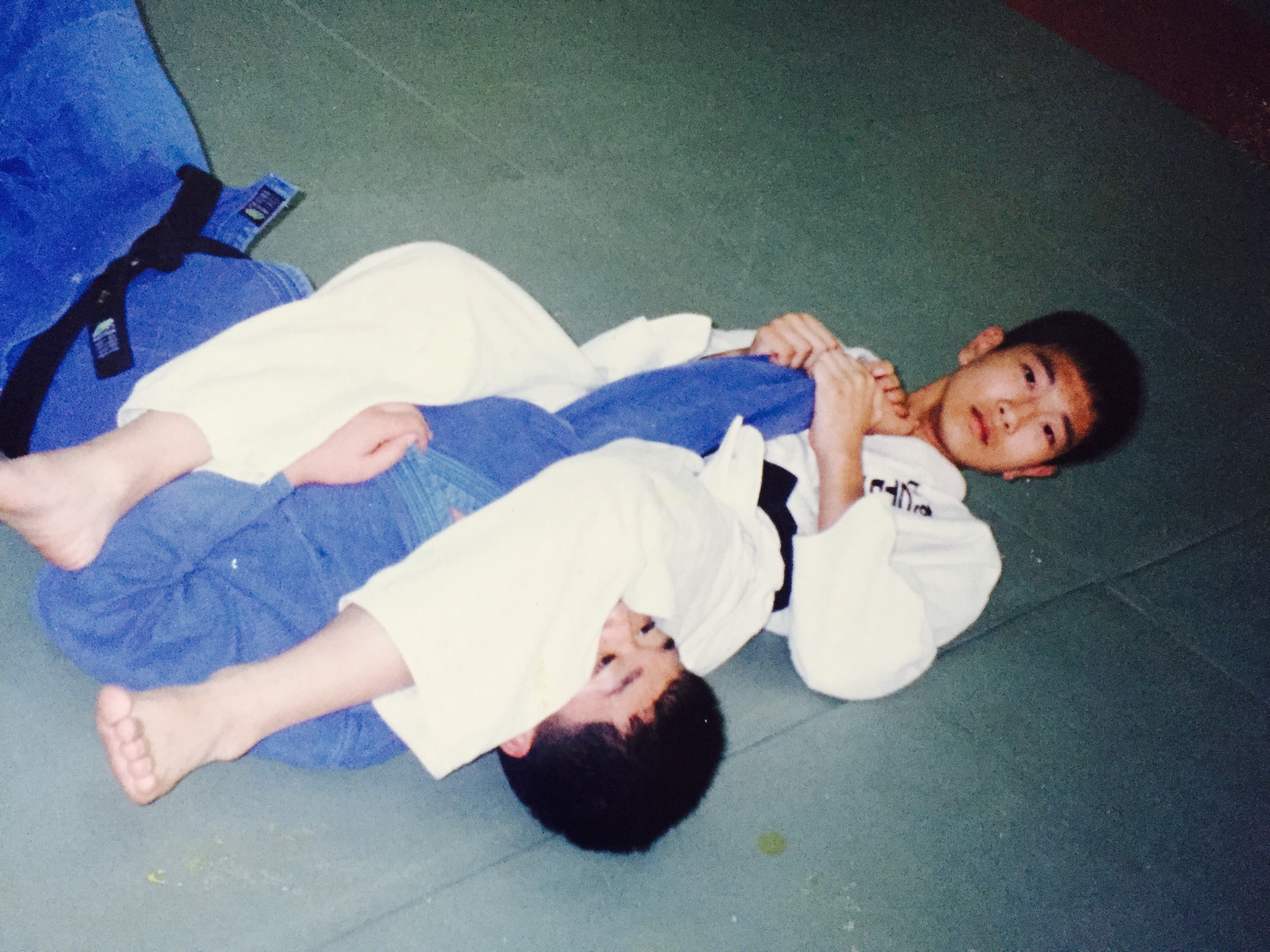 대한유도회